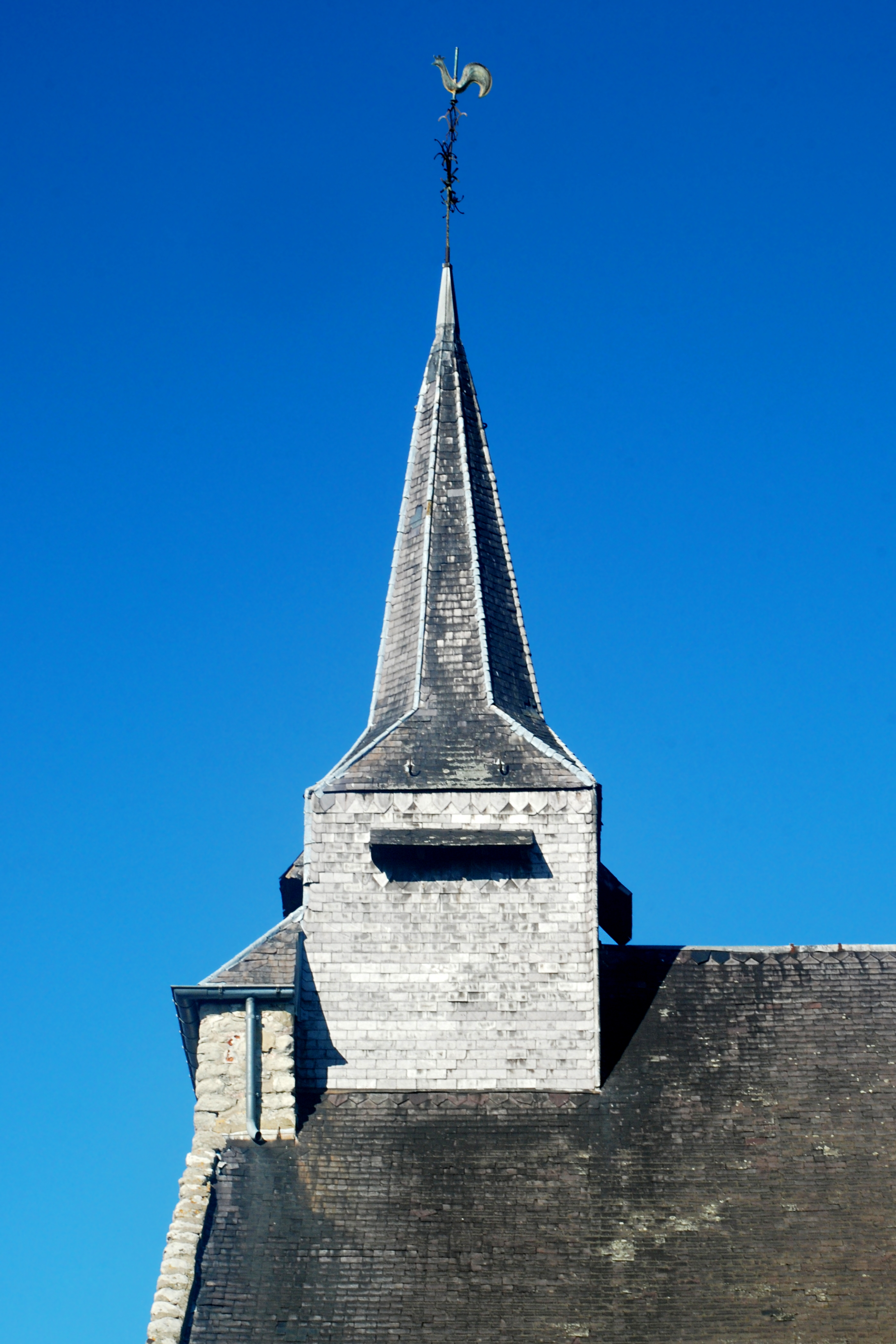 Belgique - Brabant wallon - Nivelles - Eglise Sainte-Marguerite de Thines